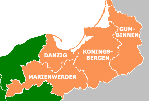 Regierungsbezirke in de prov. Pruisen 1868